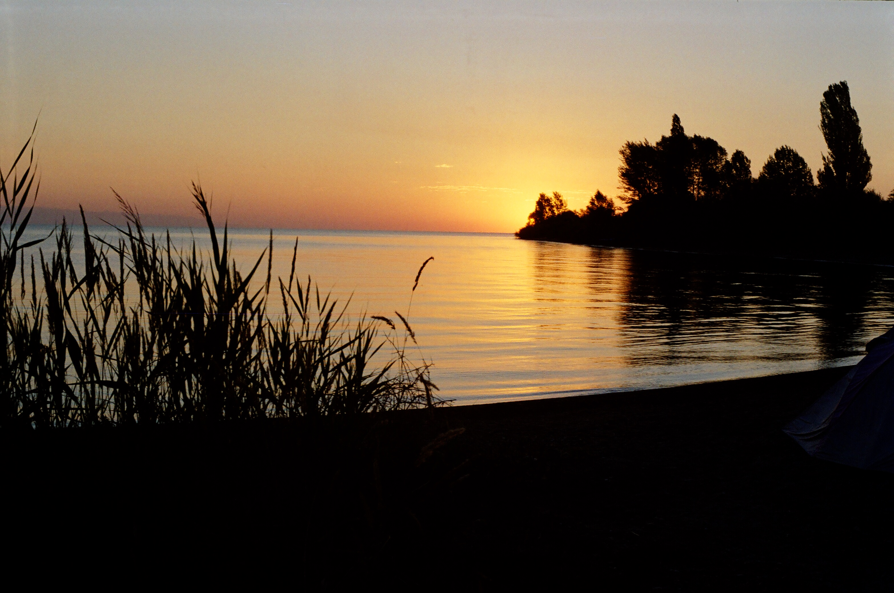 Рассвет. Озеро Иссык-куль, Киргизия 2006. Из коллекции экологической организации «Родники Белогорья».